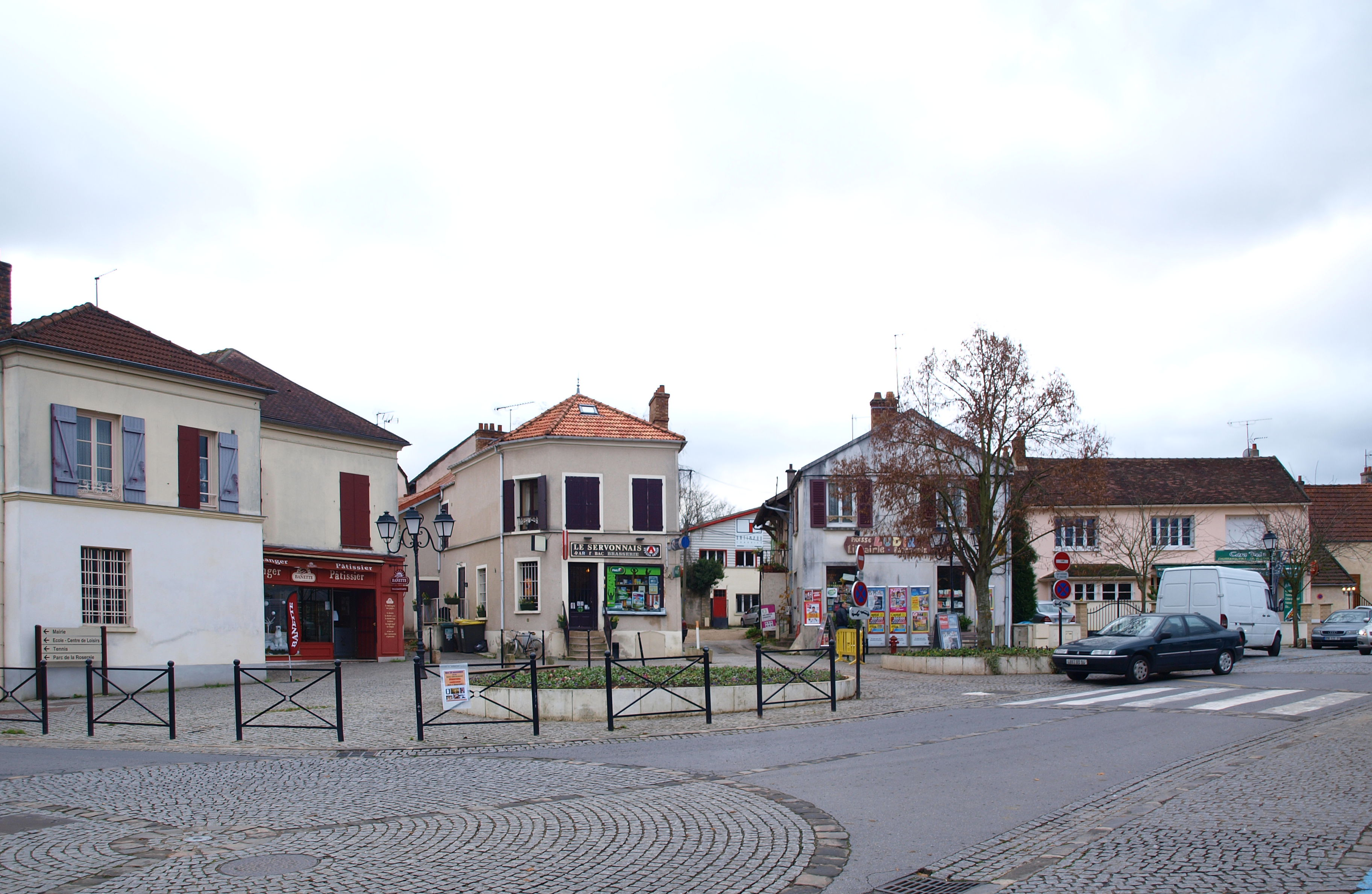 Servon (Seine-et-Marne) ; la place du centre historique